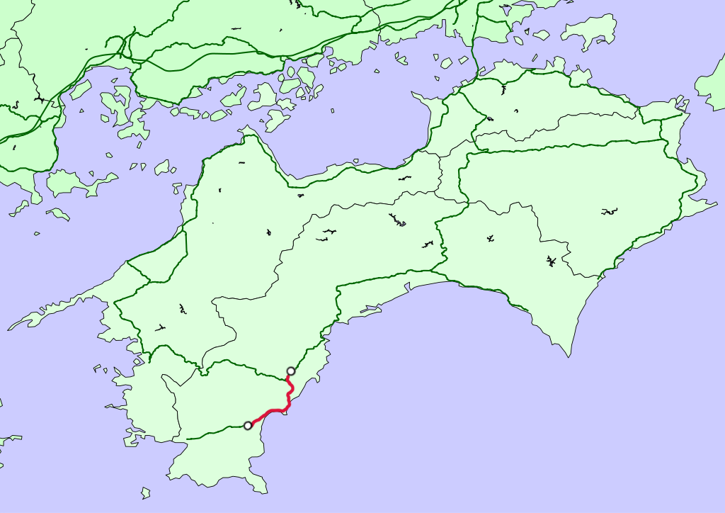 carte de la ligne Nakamura